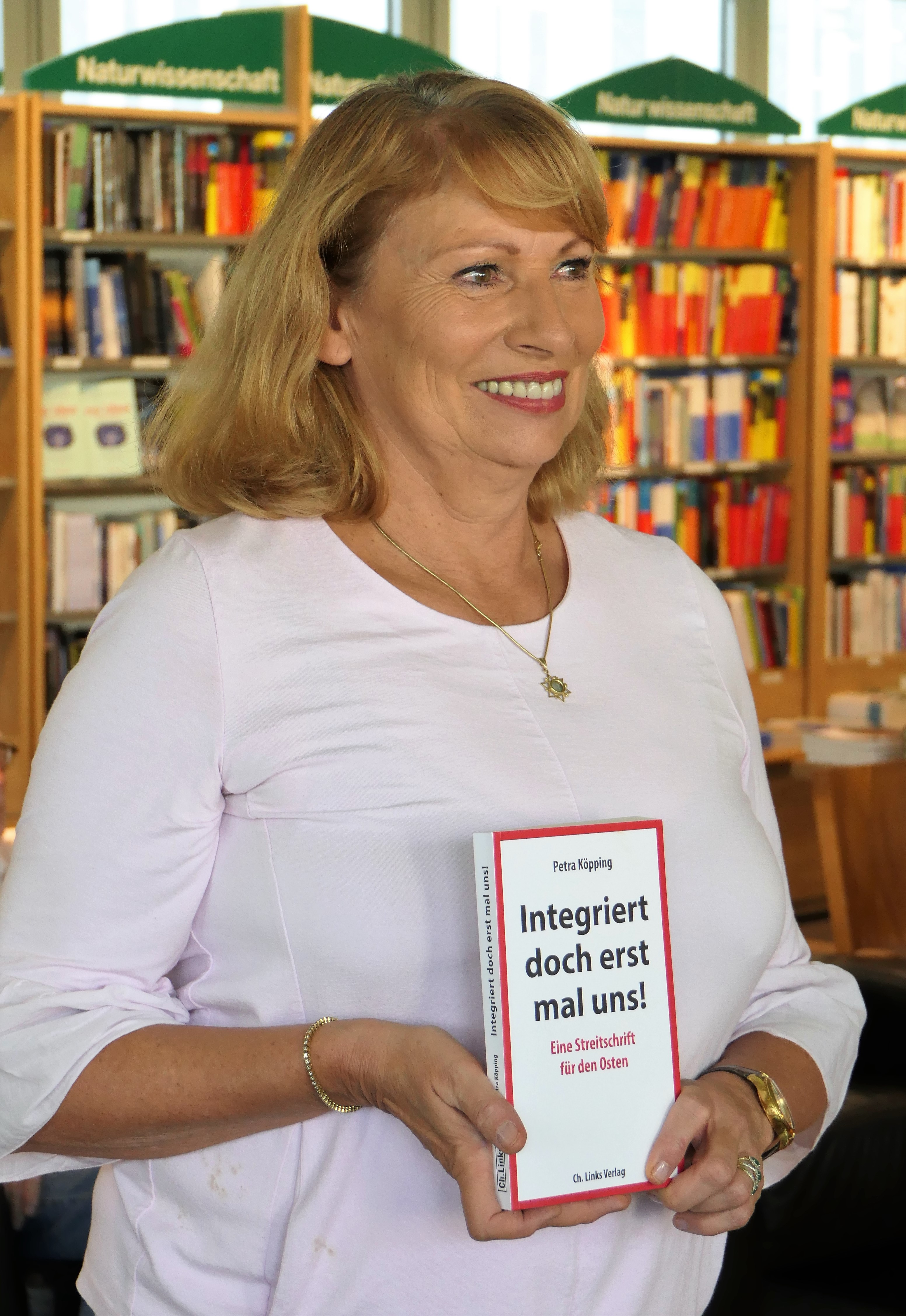 Petra Köpping, Sächsische Staatsministerin für Gleichstellung und Integration, in Dresden während der Vorstellung ihres Buches "Integriert doch erst mal uns! Eine Streitschrift für den Osten", Ch. Links Verlag 2018